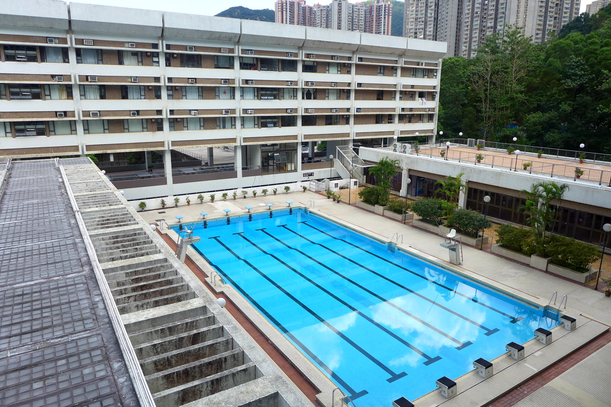 Hang Seng Management College Swimming Pool